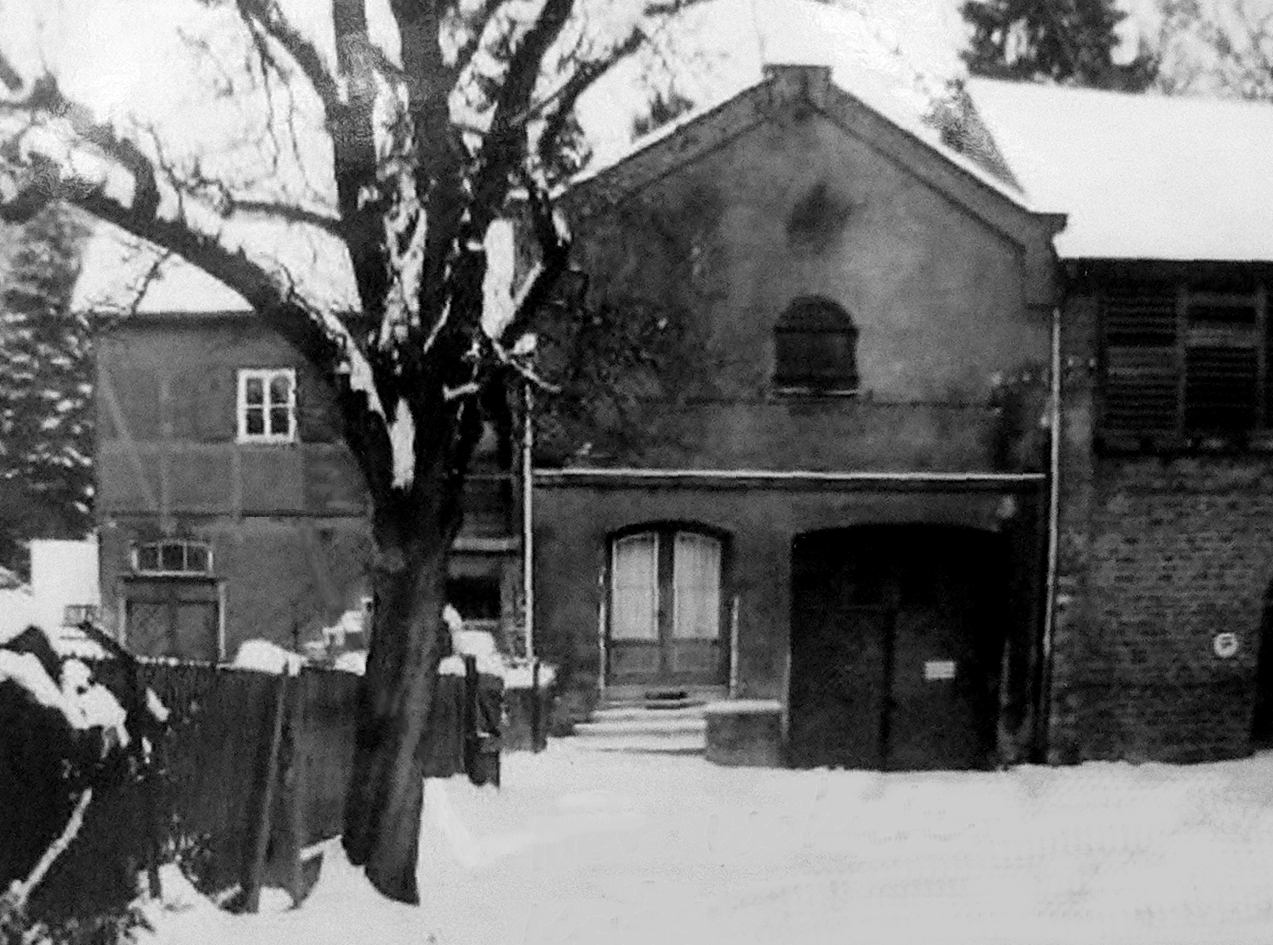 Brauerei Kümmelbacher Hof, Neckargemünd, Deutschland